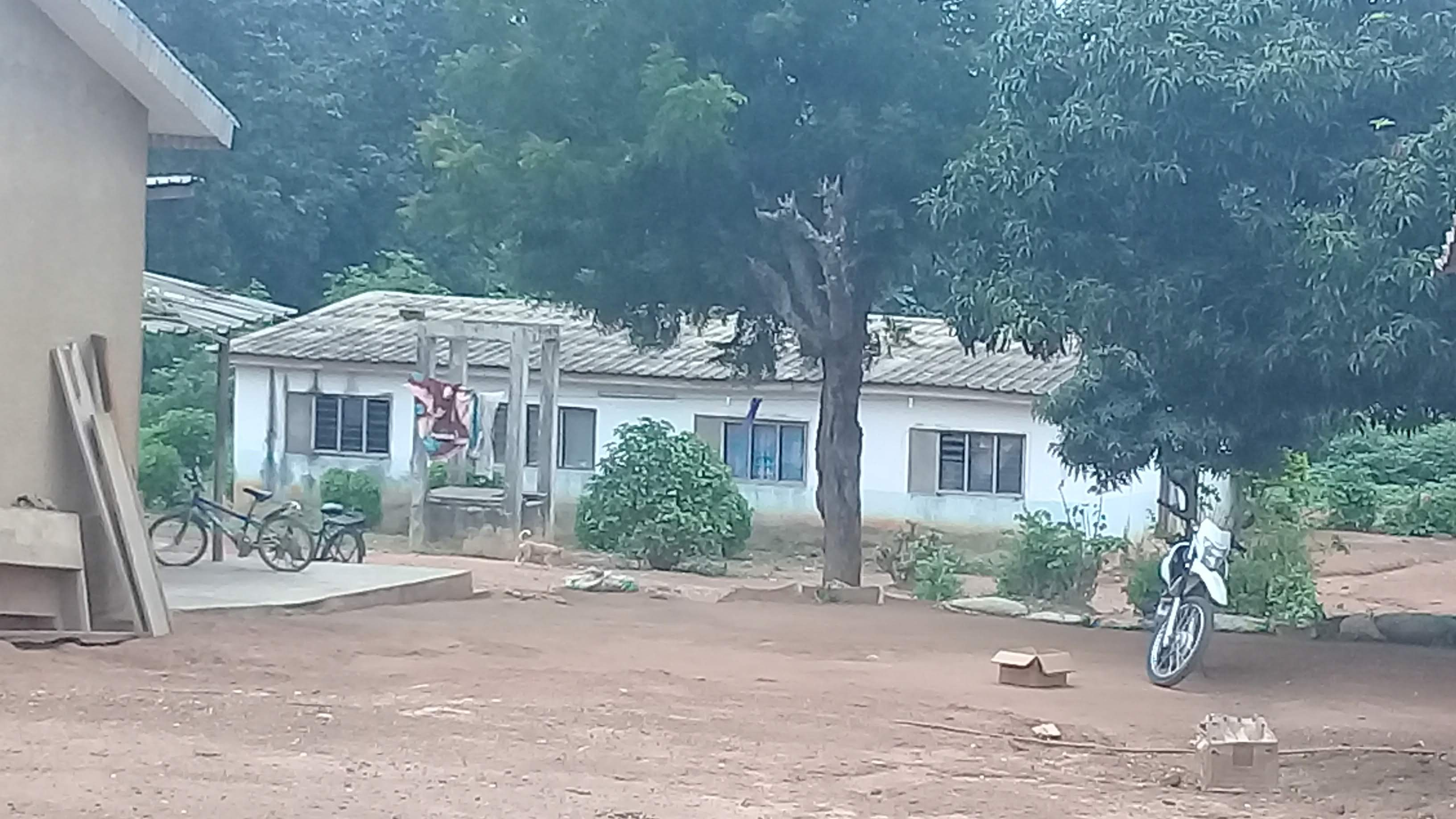 Torossanguéhi est une localité du nord-est de la Côte d'Ivoire